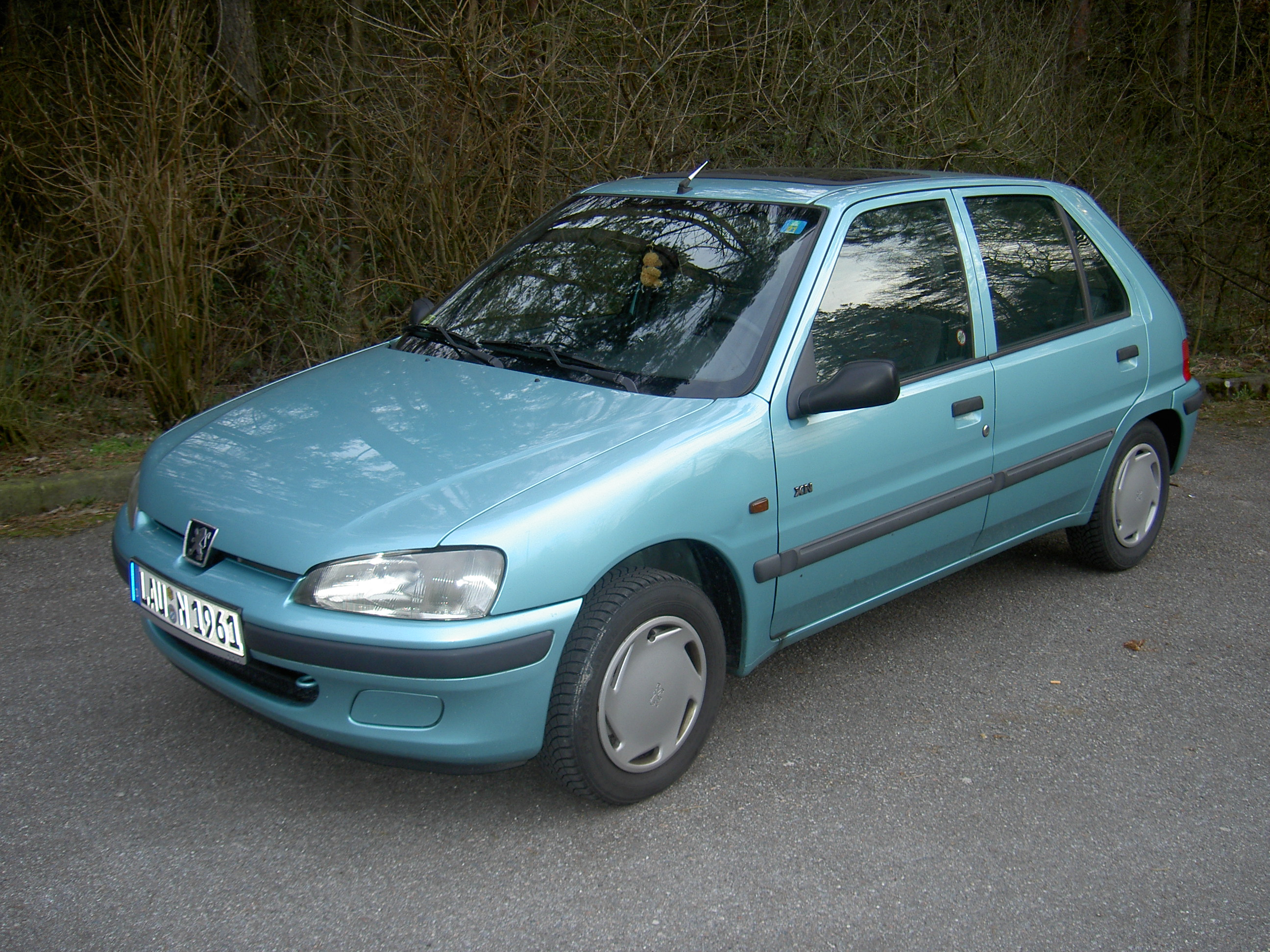 Peugeot 106 XN Serie 2. Typ 1 HDZ. Schlüsselnummern 3003 782. 44 KW. 1.1 l Hubraum. Der Wagen ist mit Bj. 12.1995 einer der ersten Serie 2 Wagen in Deutschland gewesen und der erste Besitzer war Peugeot Deutschland.